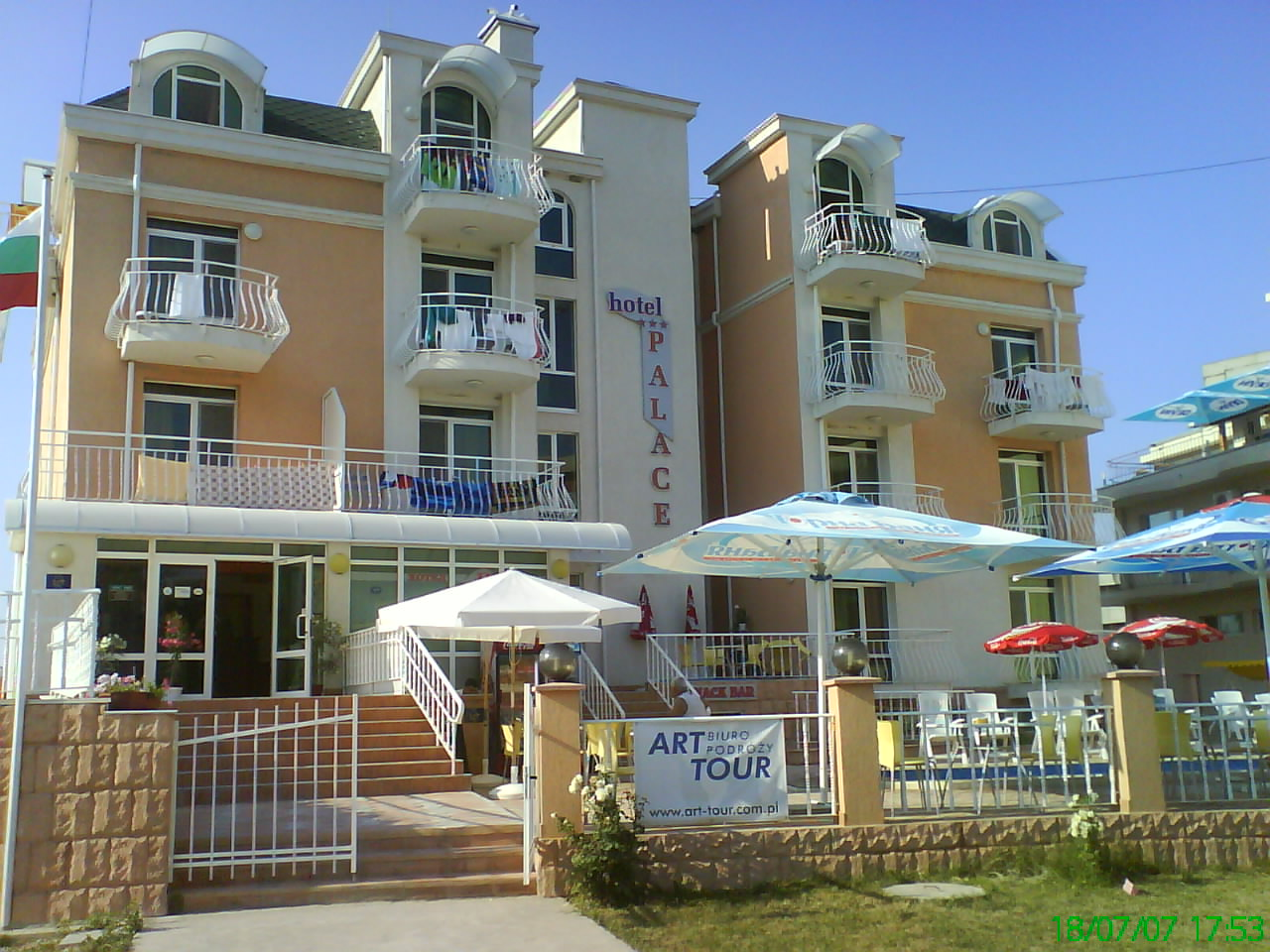 Kranevo, Bulgaria